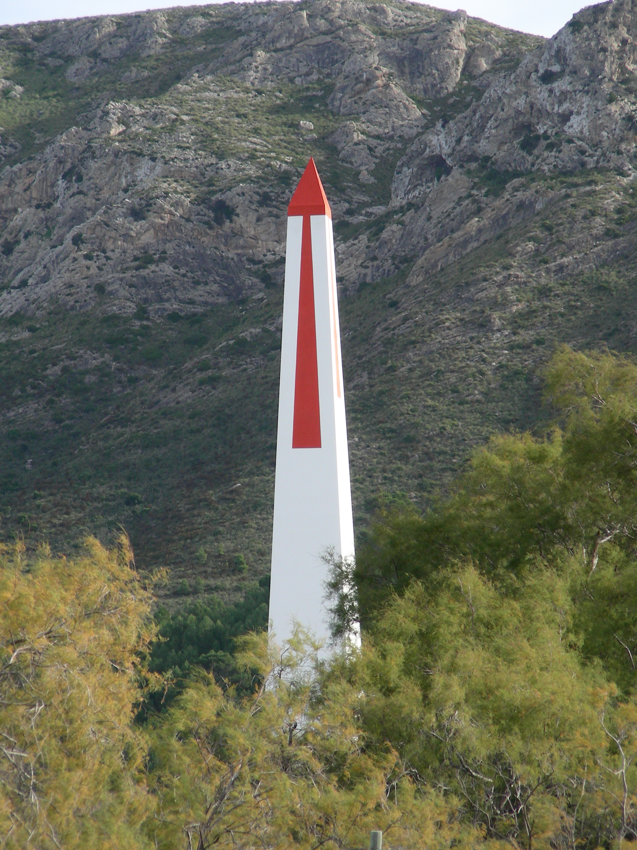 Peilturm zwischen Colònia de Sant Pere und Betlem, Gemeinde Arta, Mallorca, Spanien